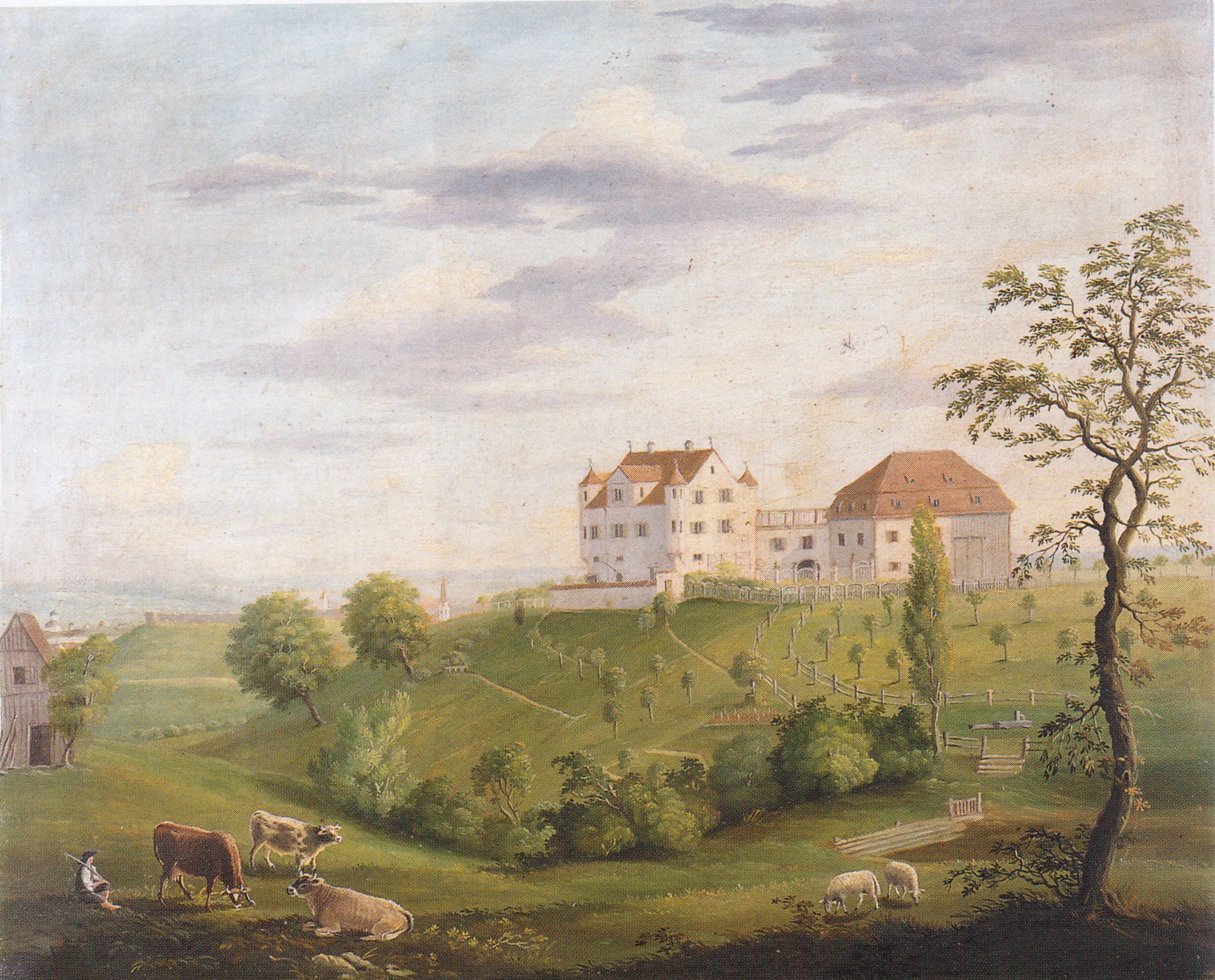 Das 1972 abgerissene Schachenmeyersches Landgut in Kempten